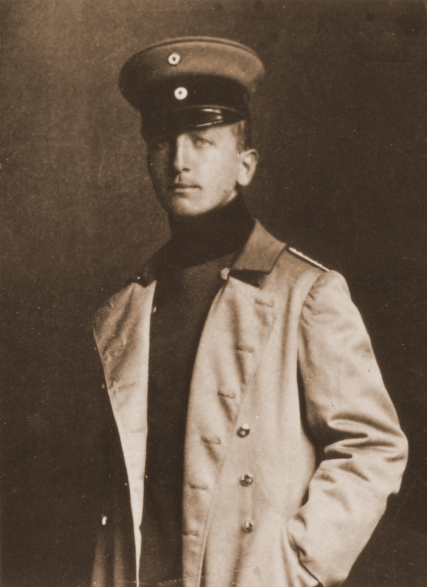 Beschreibung: Karl Ritter als junger Offizier im 3 bayerischen Pionierbataillon in München 1910 Quelle: Familienbesitz